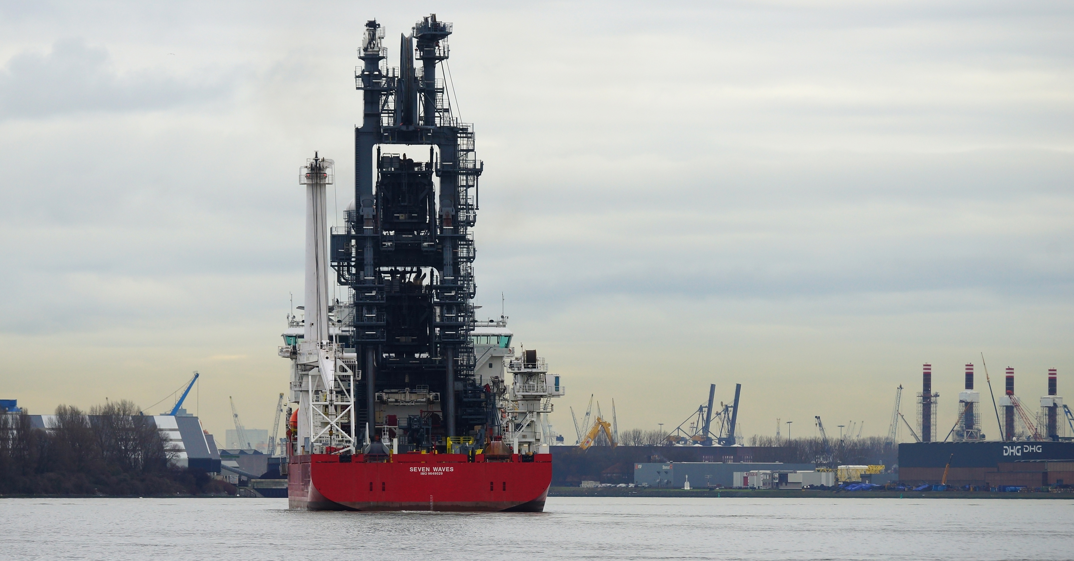 Nieuwe Maas Schiedam